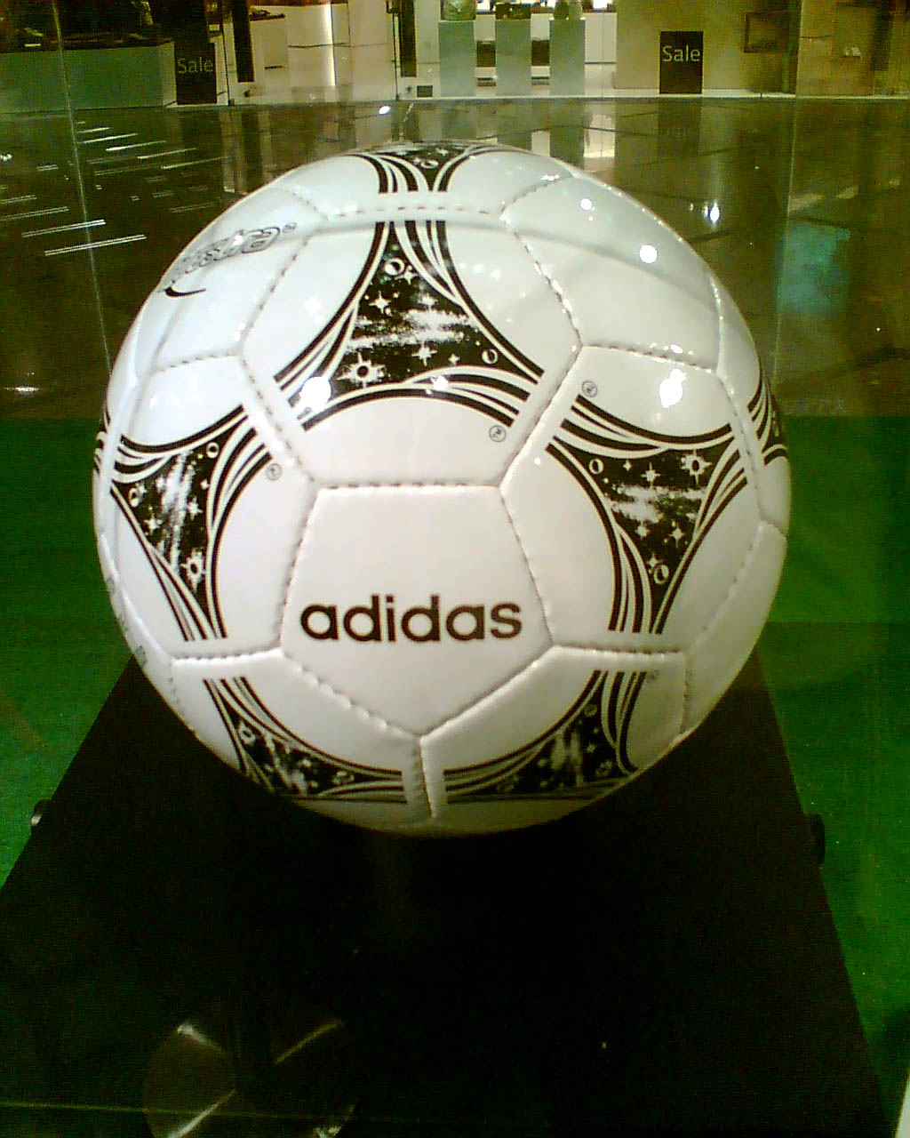 中文（香港）: 愛迪達Questra；用Photoshop Elements調整色彩及對比